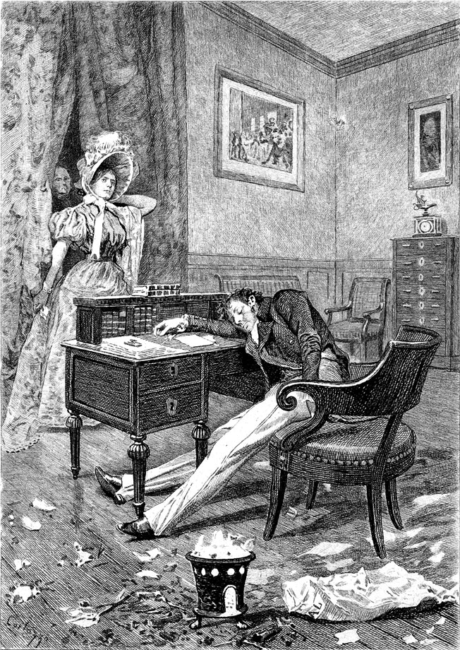 Illustration of Honoré de Balzac's Albert Savarus (1842).